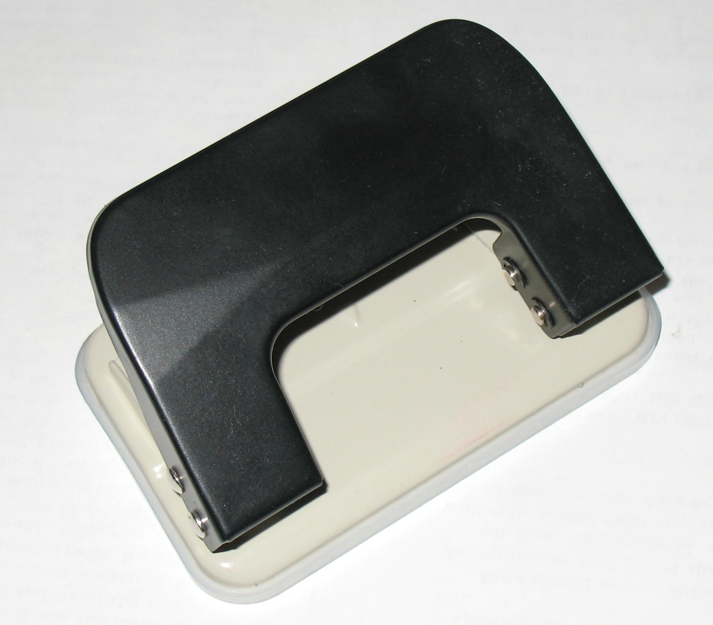 a hole punch (ein Locher)